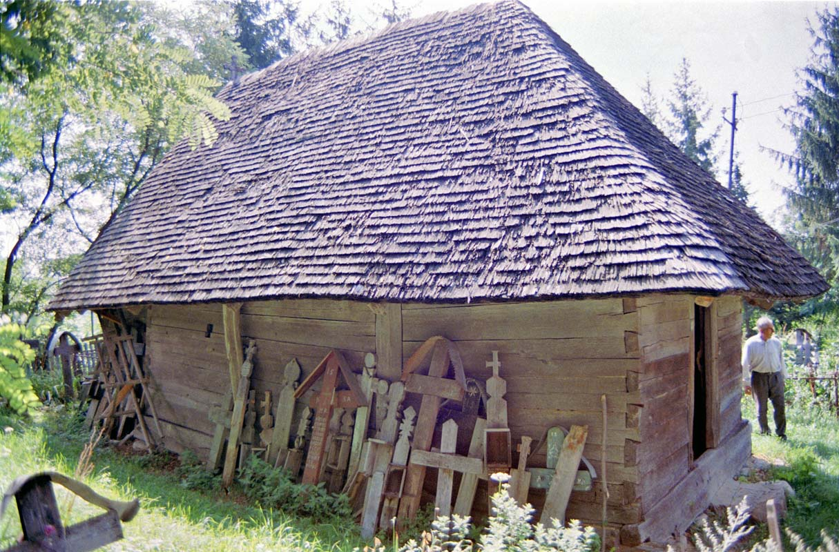 Mariţa, judeţul Vâlcea, biserica de lemn, peretele sudic.